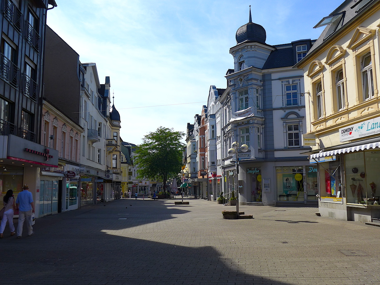 Дюссельдорфер Штрассе (улица Дюссельдорфская) в городе Золинген, Германия.